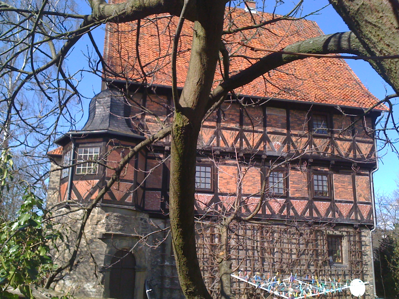 Eines von zwei Gebäuden des sogenannten Adelshofes oder Forstamtes Langelsheim